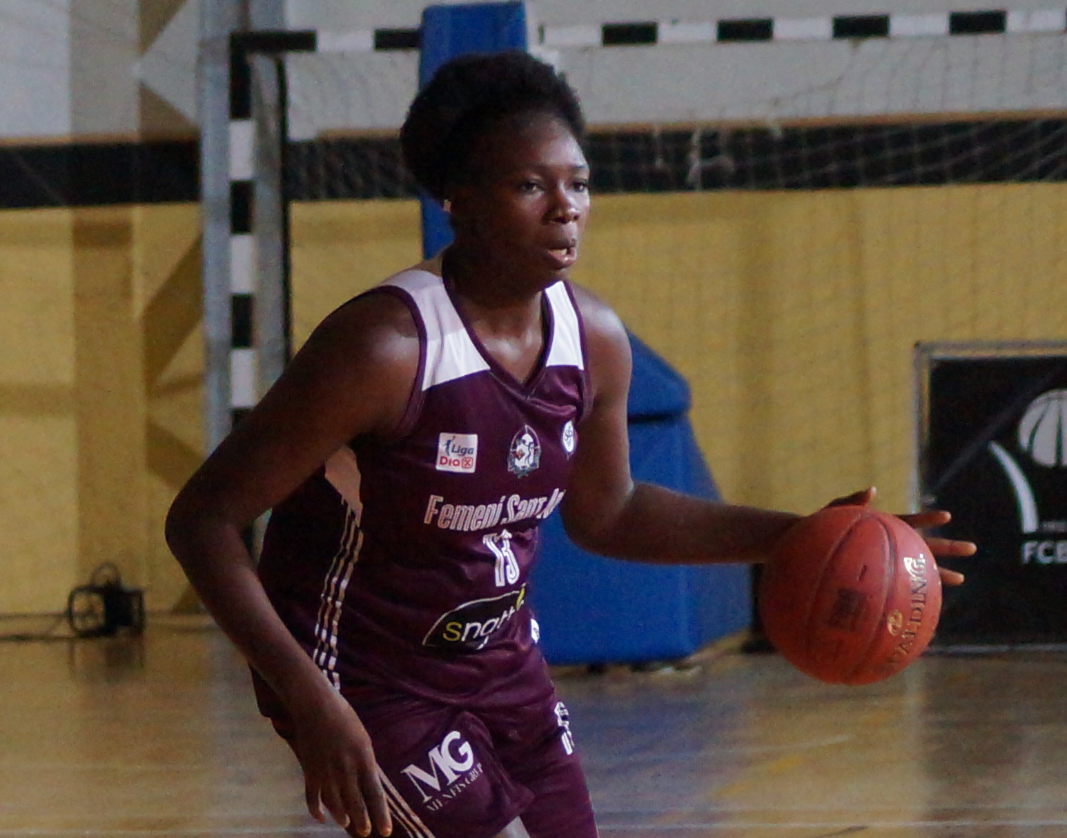 Mariam Coulibaly, jugadora de l'Snatt's Femení Sant Adrià en un partit davant el Cadí La Seu